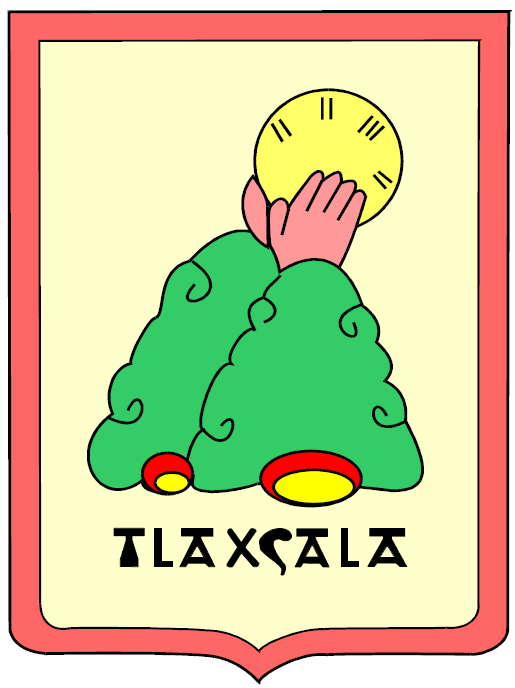 Escudo del municipio de Tlaxcala